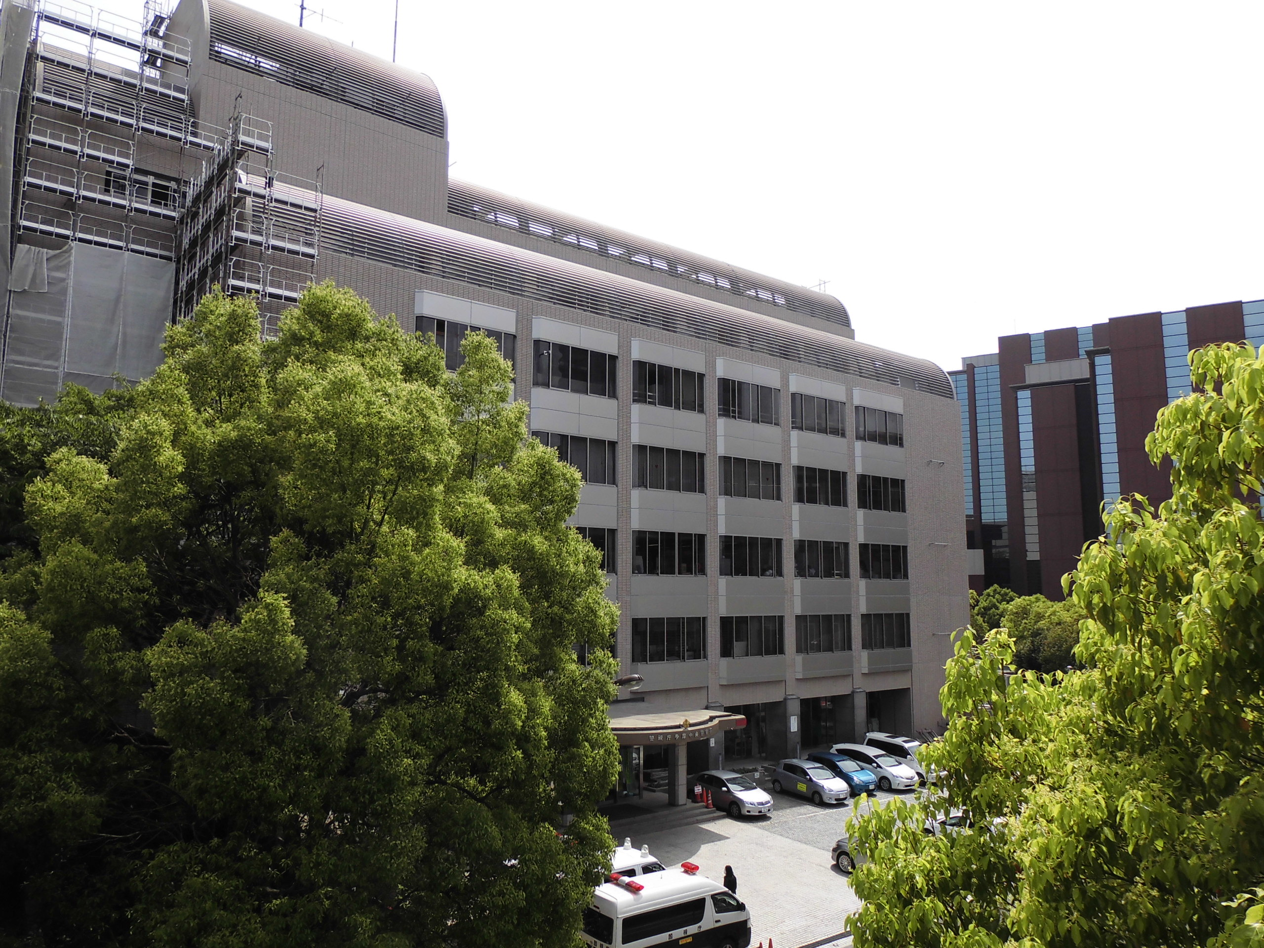 警視庁 多摩中央警察署